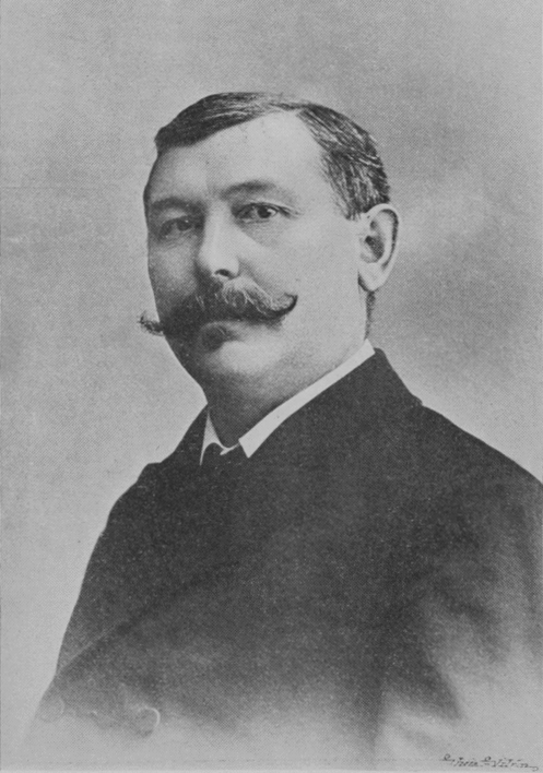 Karel Fajfrlík